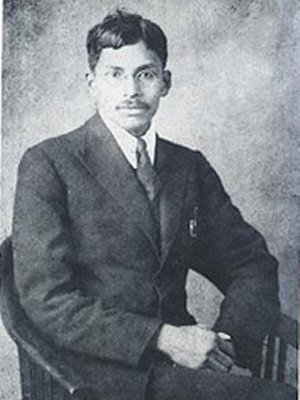 Meghnad Saha in Berlin, 1921